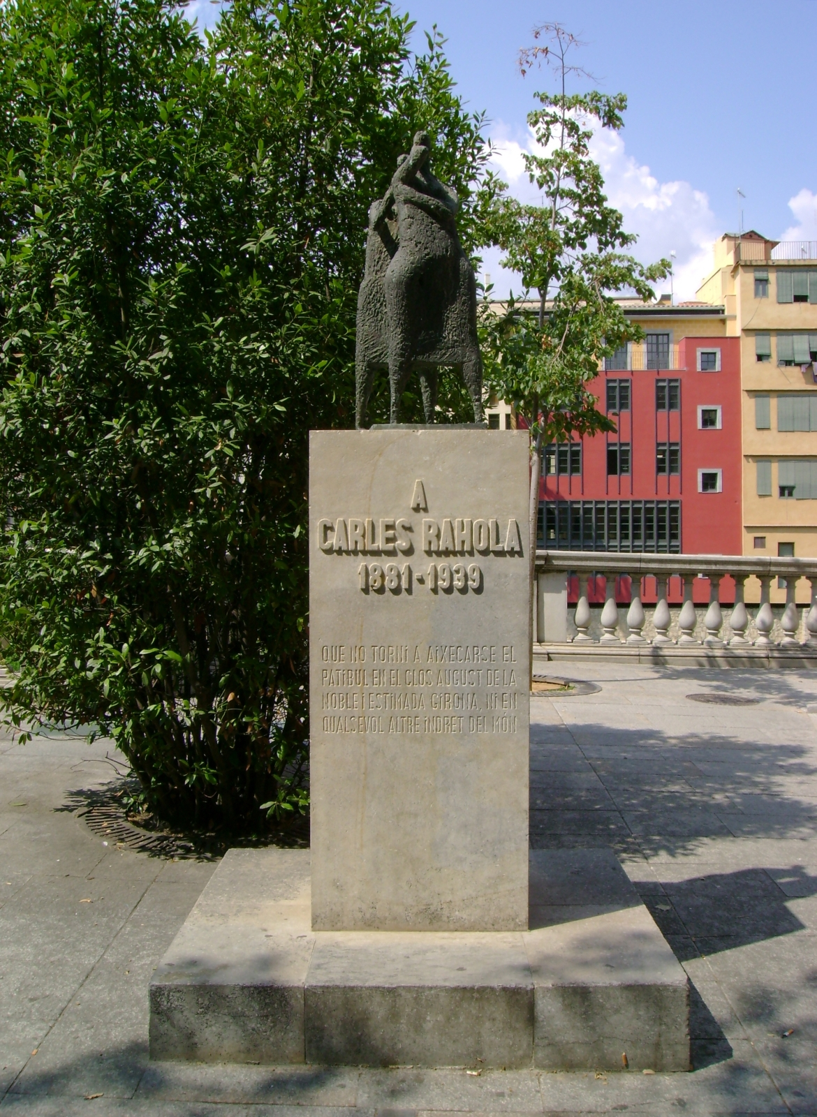 Monolito en honor a Carles Rahola en Gerona